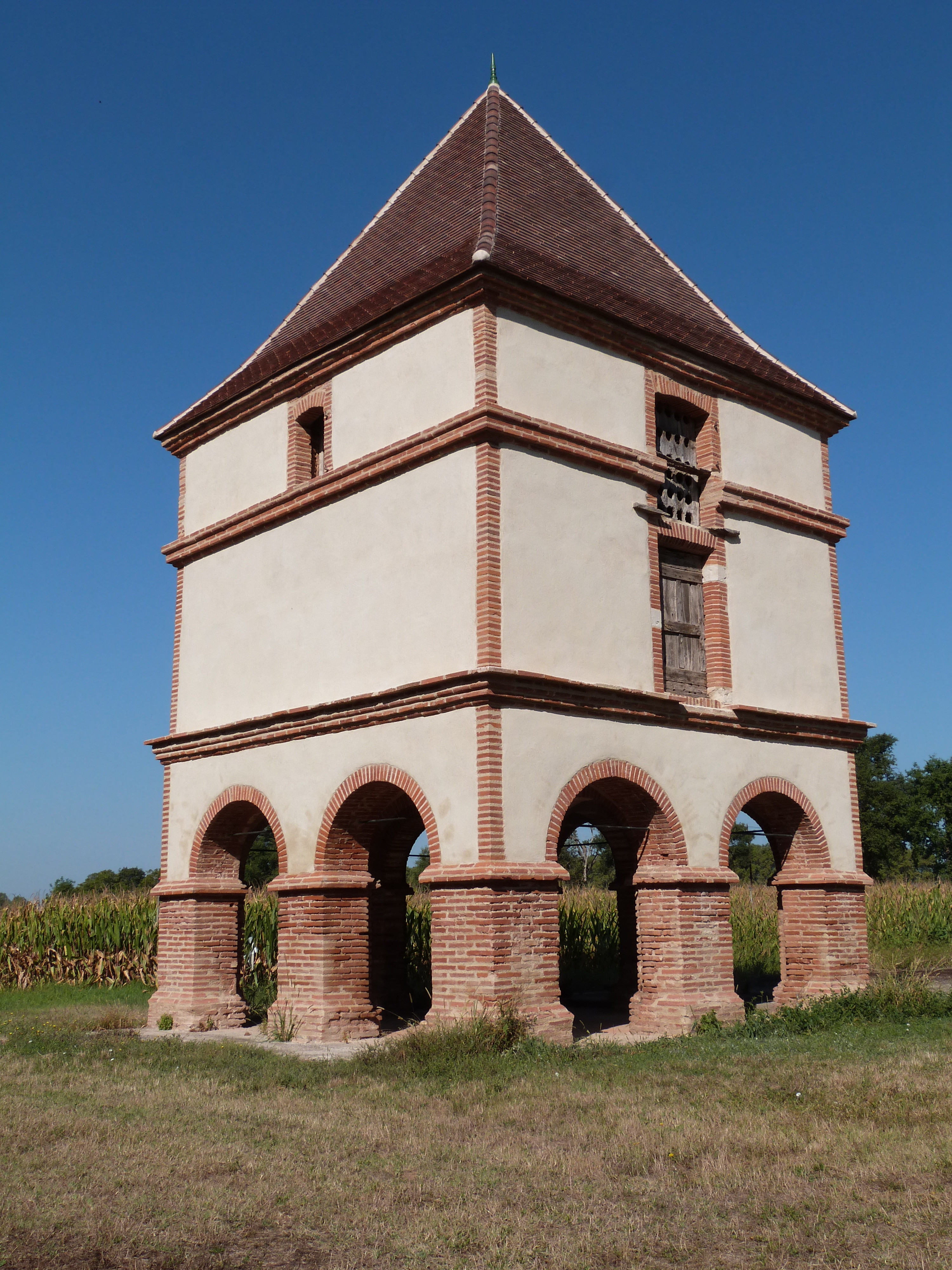 Pigeonnier du château de Lastours à Lisle-sur-Tarn (Tarn)